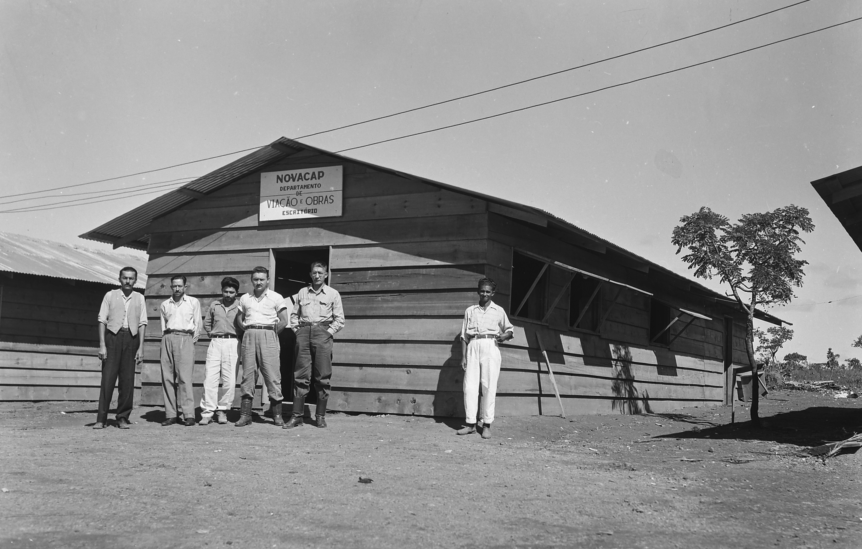 Imagem do Fundo Agência Nacional, do Arquivo Nacional